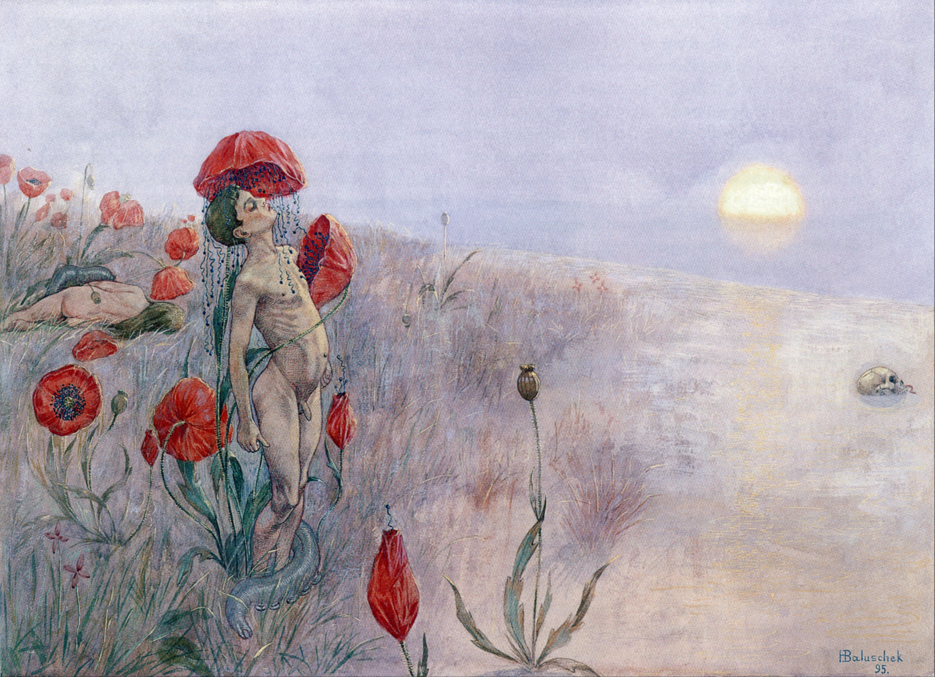 (Allegorie auf den Tod)